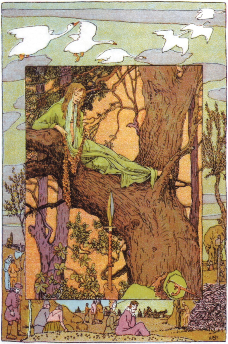 Illustration des Grimm'schen Märchens „Die sechs Schwäne“ (KHM 49) von Heinrich Vogeler